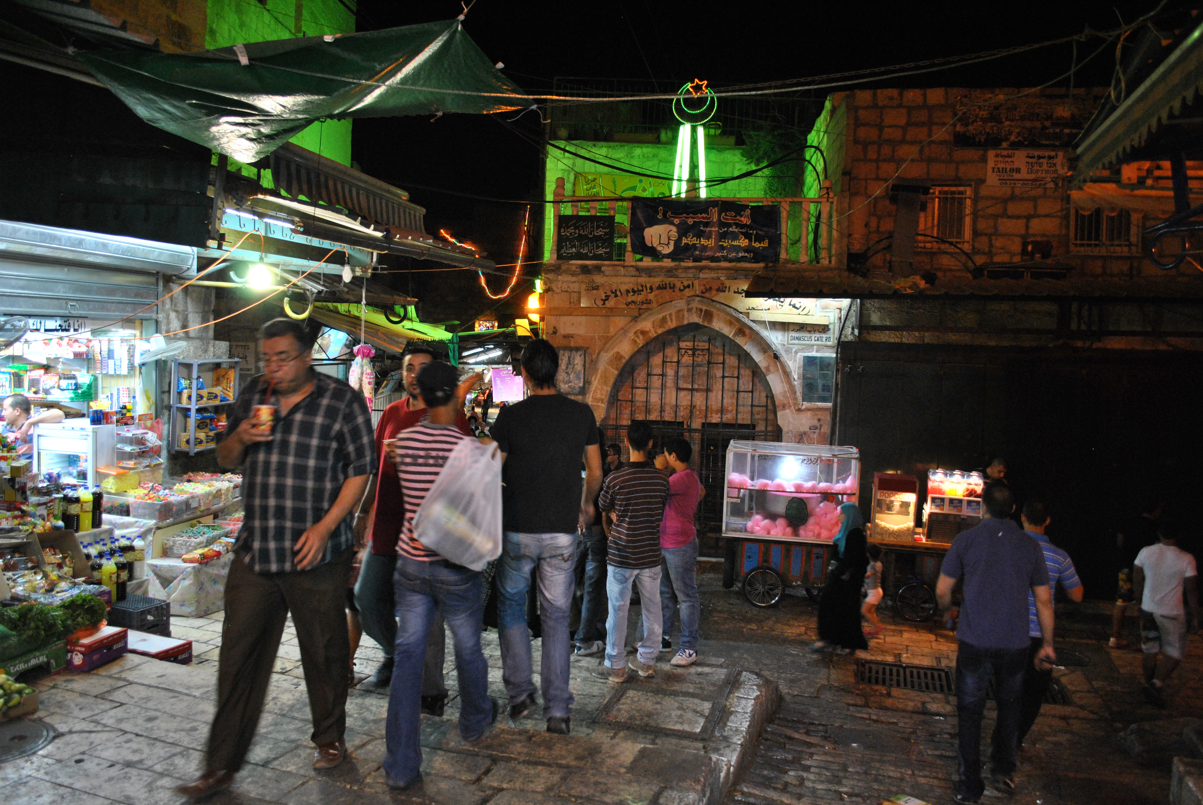 Por la noche.